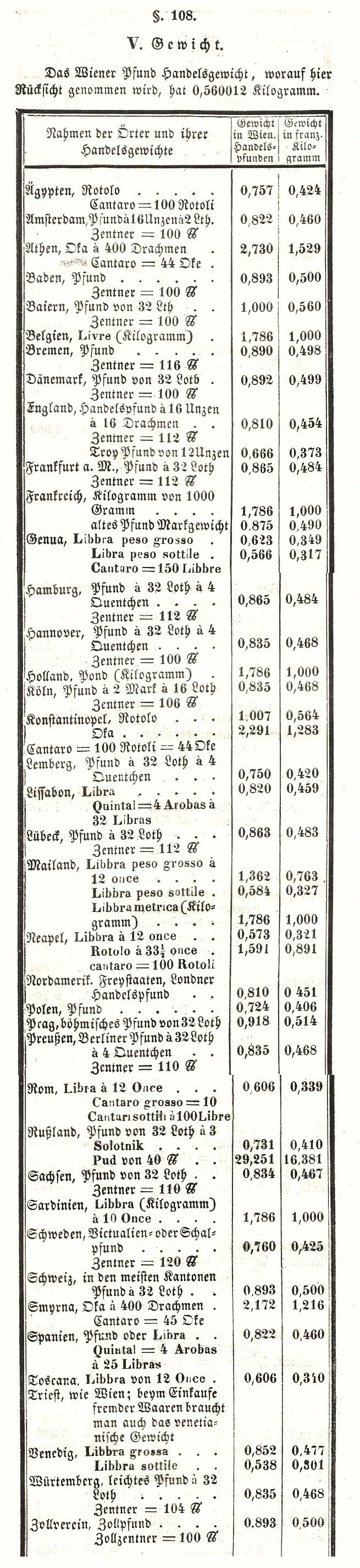 Alte Maßeinheiten / Gewichtmaße